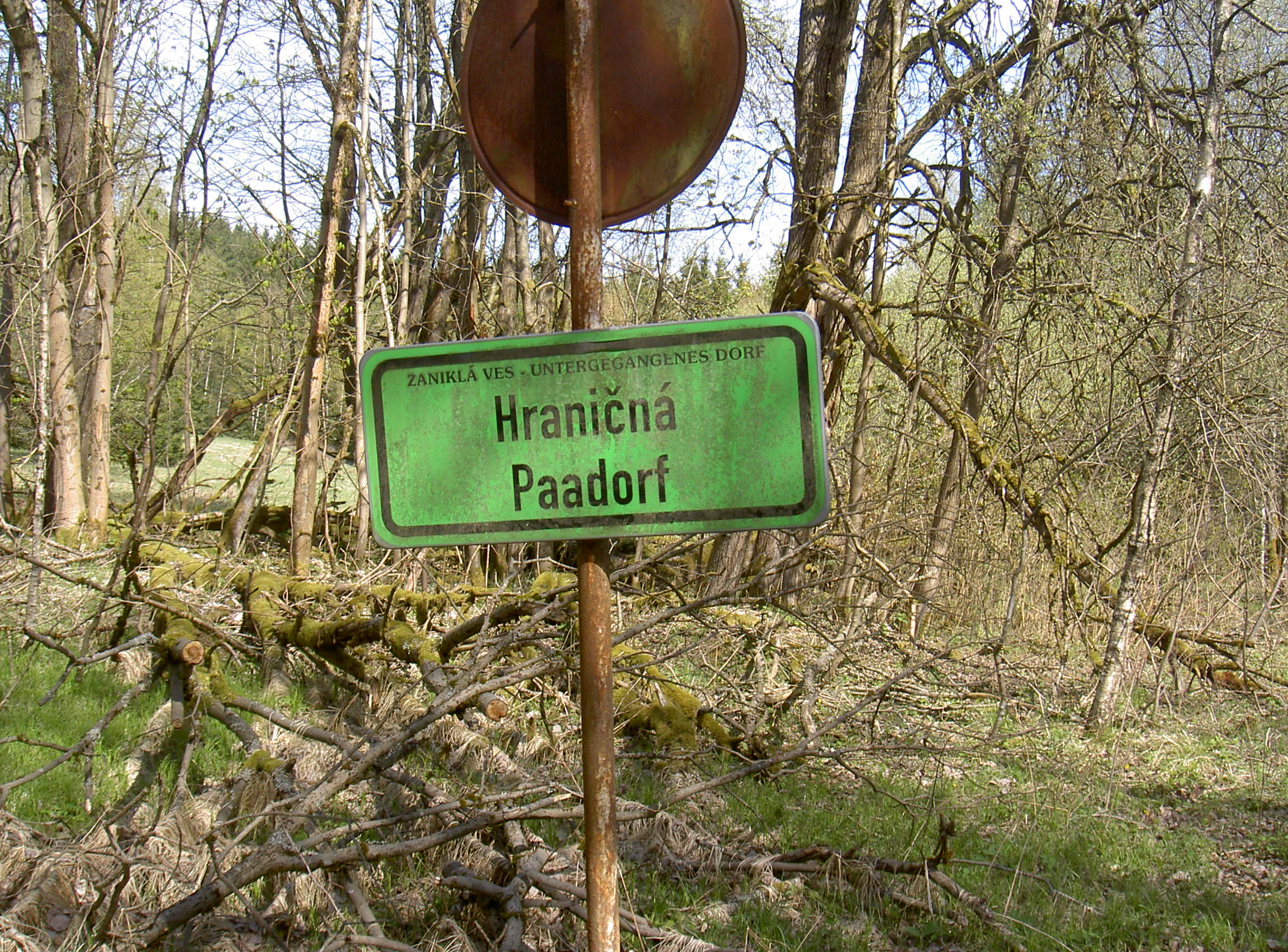 Paadorf